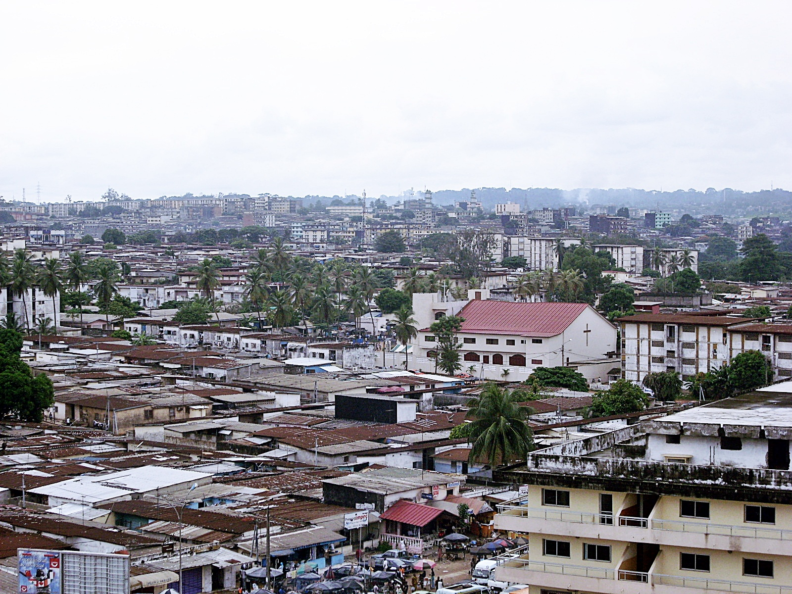 vue aérienne Adjamé, Abidjan